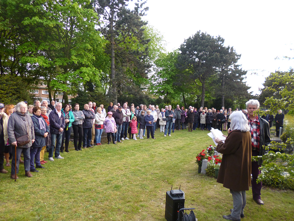 Jaarlijkse herdenking van Jan Bonekamp, 4 mei 2014 op de Westerbegraafplaats in IJmuiden.